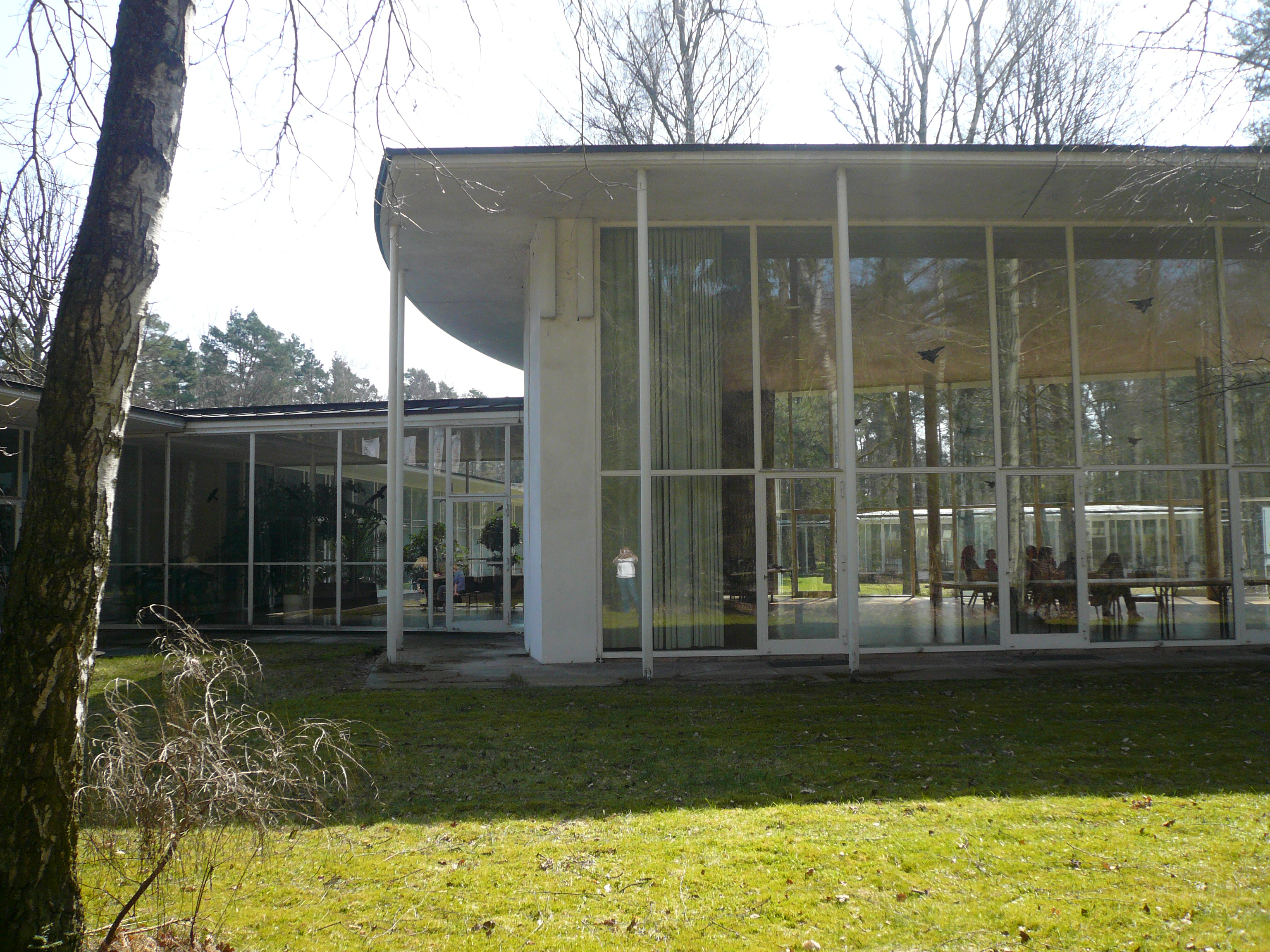 Aula der Akademie der Bildenden Künste Nürnberg